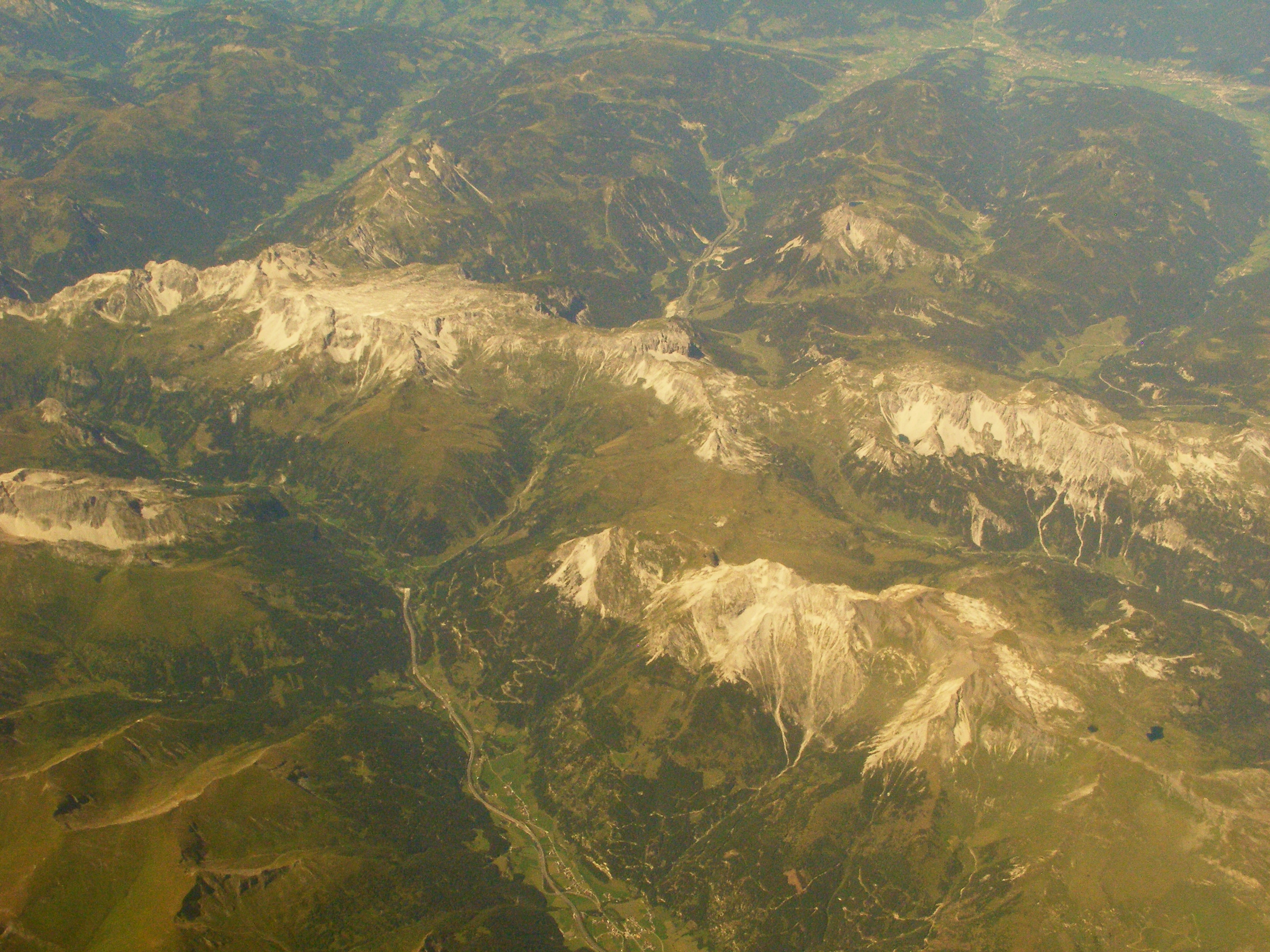 Tauern Autobahn A10 und Tauerntunnel